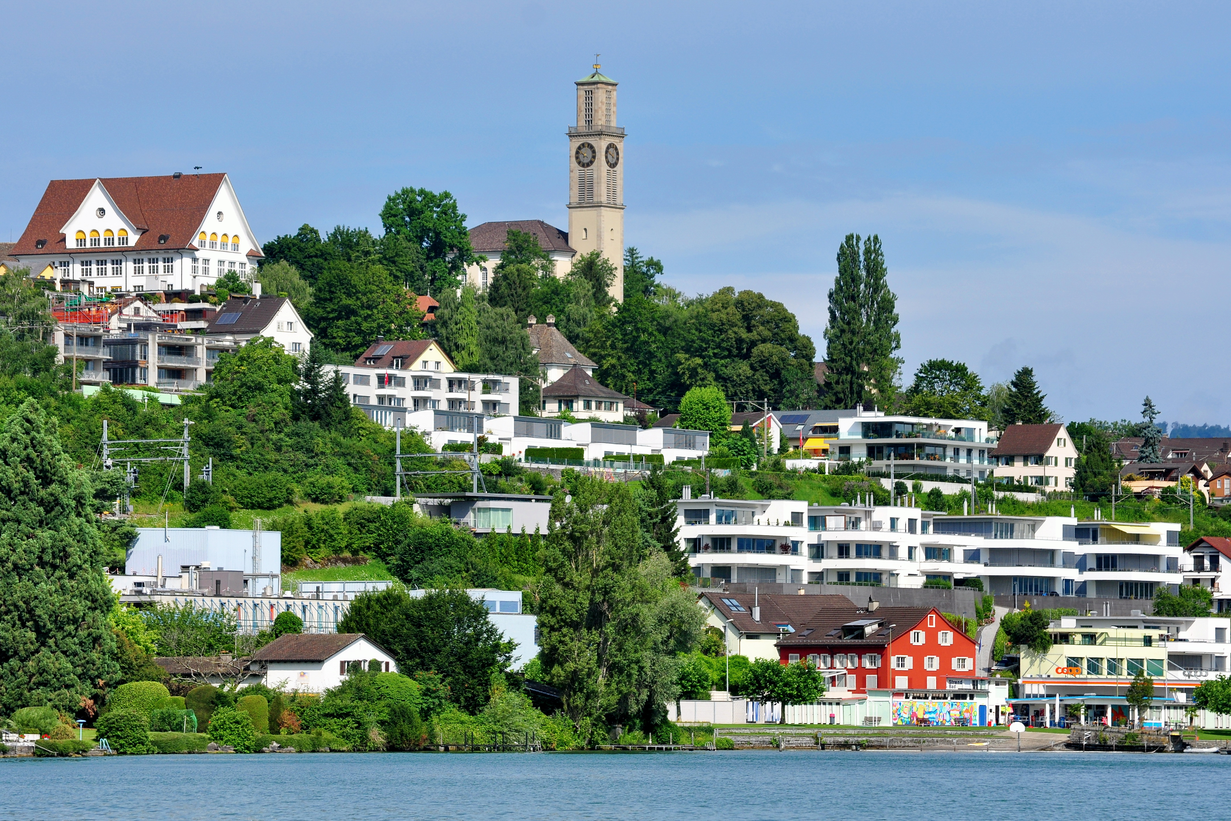 Thalwil as seen from Zürichsee-Schiffahrtsgesellschaft (ZSG) MS Wädenswil on Zürichsee in Switzerland